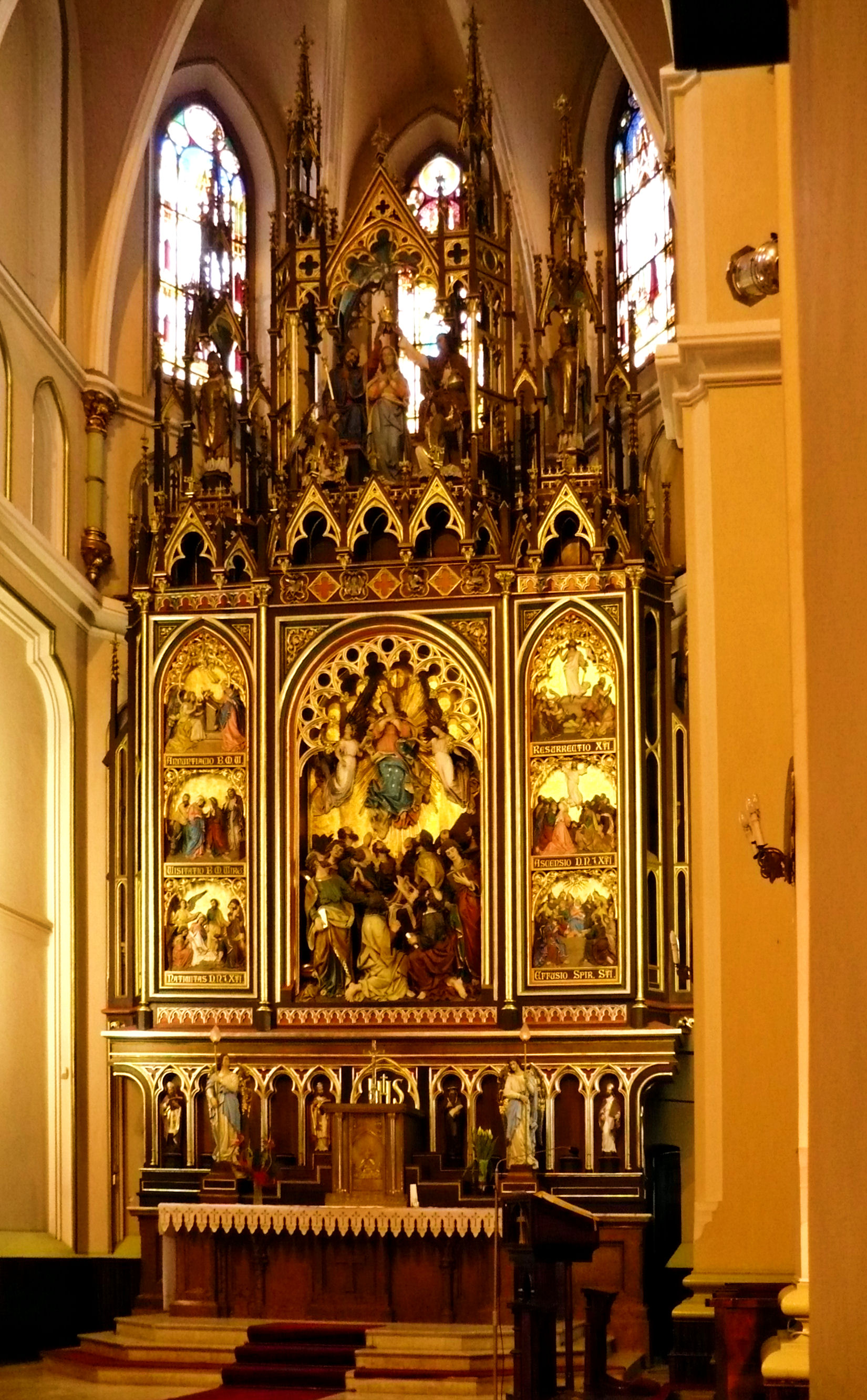 Łódź - Neogotycki kościół Wniebowzięcia NMP (1888–1897).